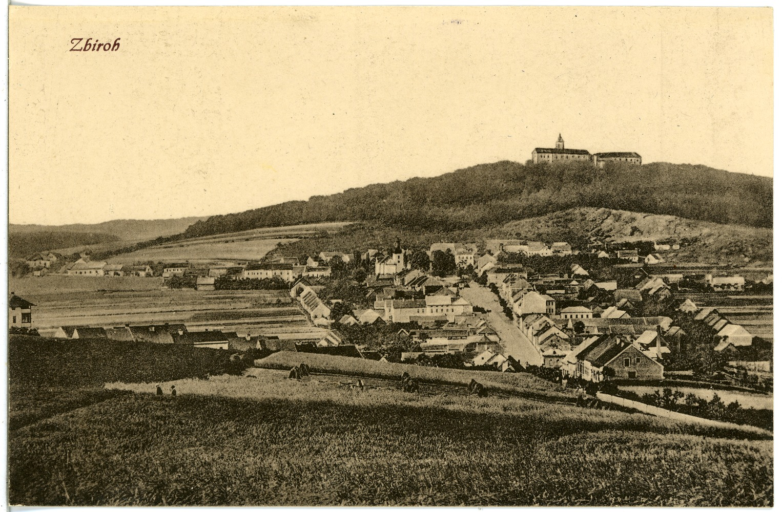 Zbiroh; Blick auf Zbiroh This postcard is from publisher Brück & Sohn in Meißen ( postcard has a unique number 21474 and is available in a higher resolution at the publisher. This images was uploaded in a cooperation project between Wikipedians and the publisher.